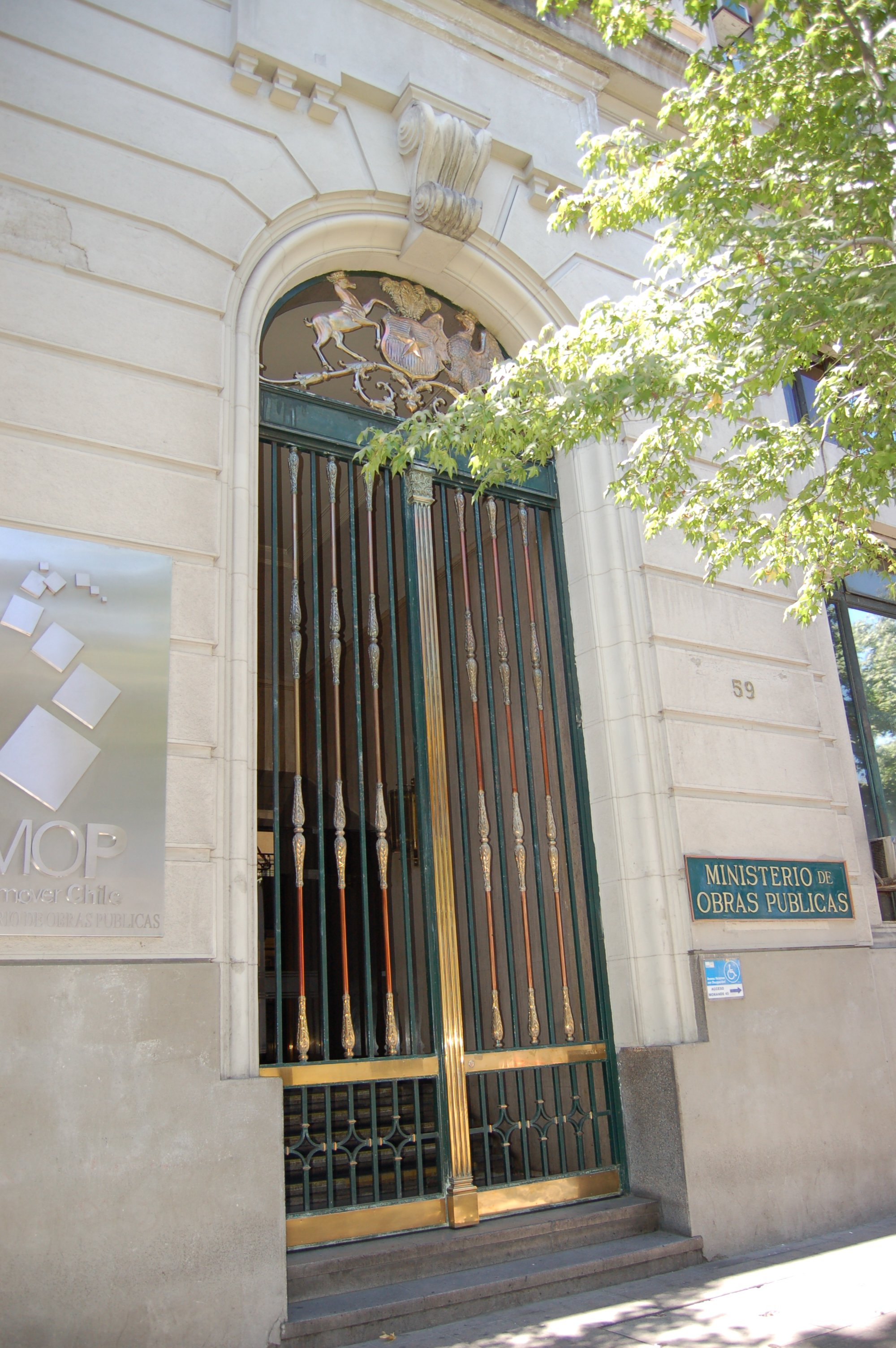 Puerta principal de acceso al edificio del Ministerio de Obras Públicas, en Santiago de Chile.